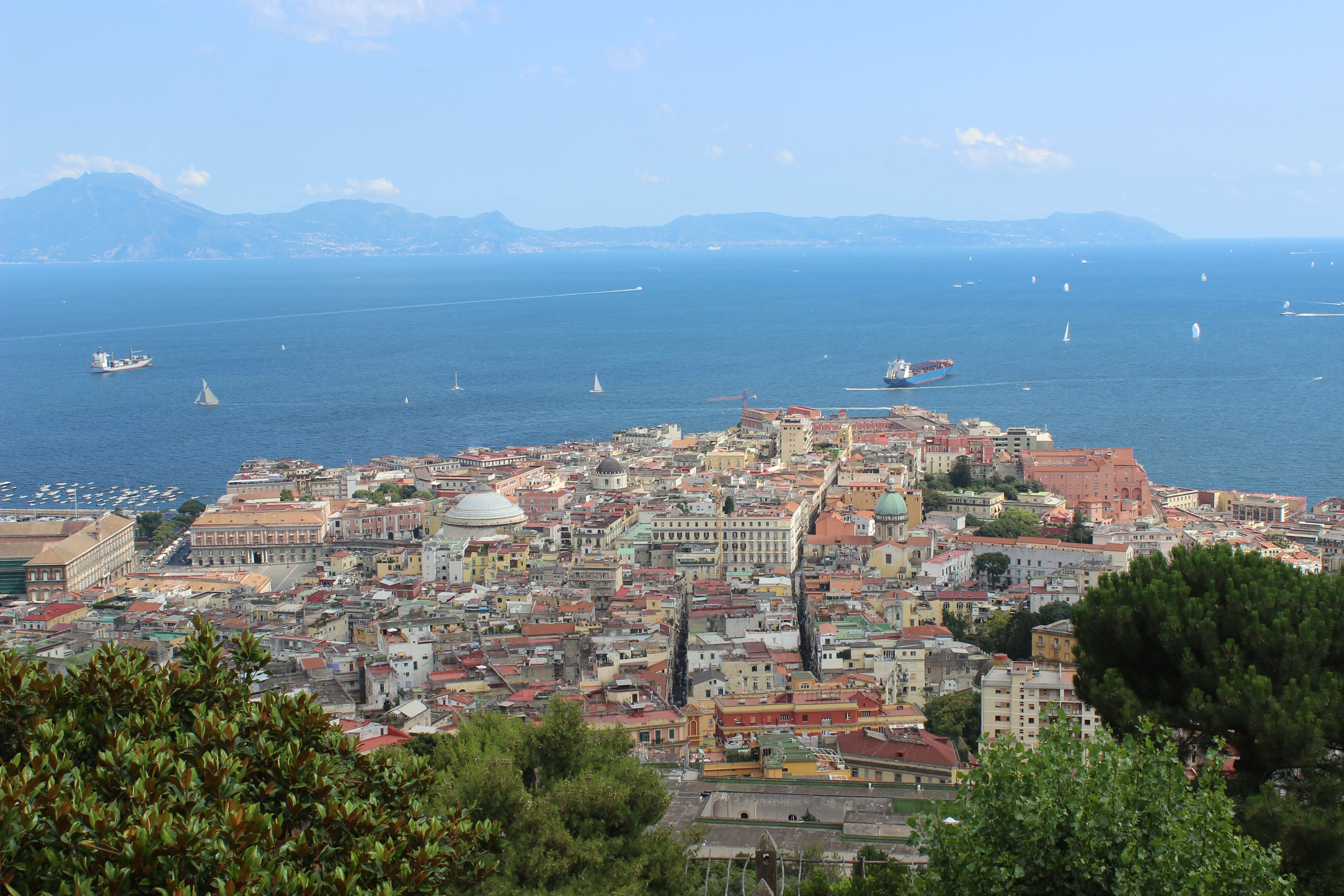 Vista de Pizzofalcone desde la Certosa di San Martino.